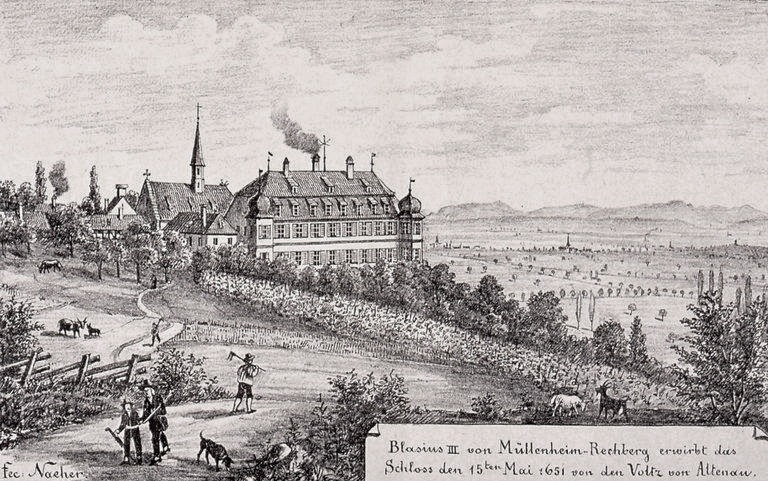 Das Schloss Kolbsheim bei Molsheim. Bibliothèque nationale et universitaire de Strasbourg